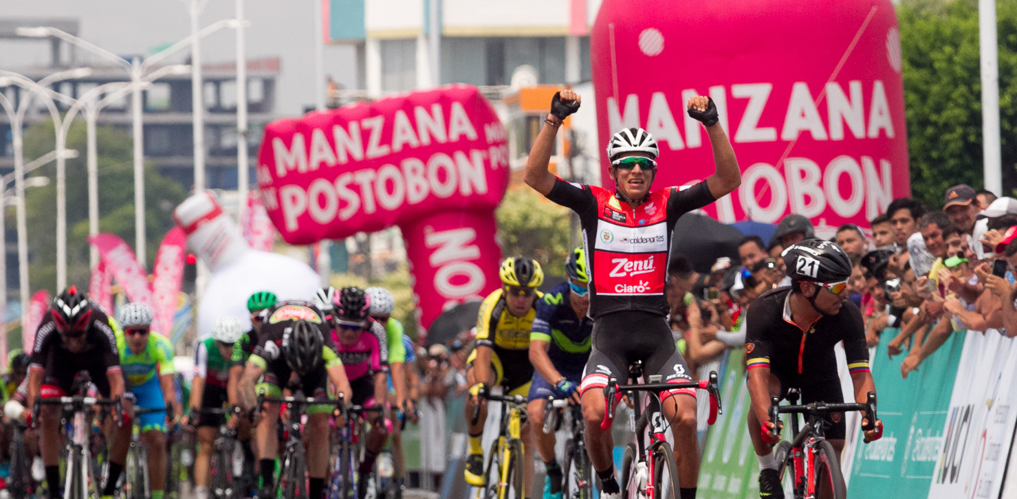 Sprint final. Eta.3 Vuelta a Colombia 2017 Jueves 3 de agosto de 2017. Puerto Boyacá - Barrancabermeja.